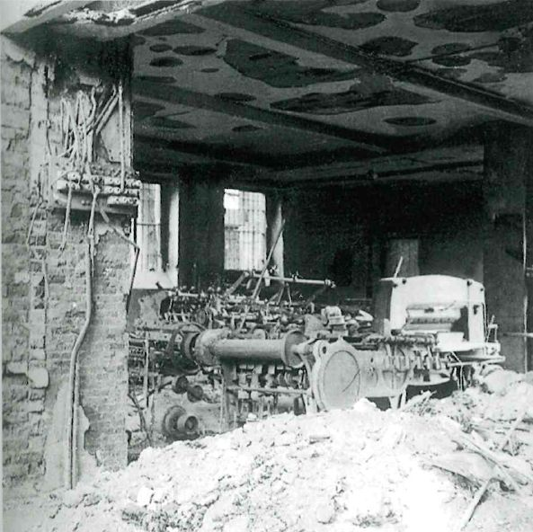 Zerstörtes Firmengebäude der Schlüterschen nach Bombenangriff im Zweiten Weltkrieg, November 1943